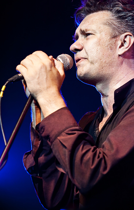 Концерт 15 октября 2009 года в «Б2